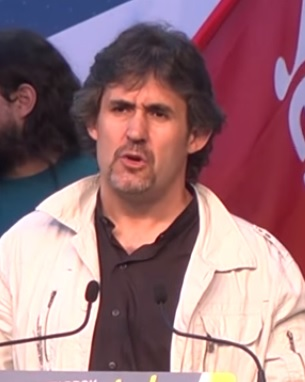 Pello Urizar, 2015.